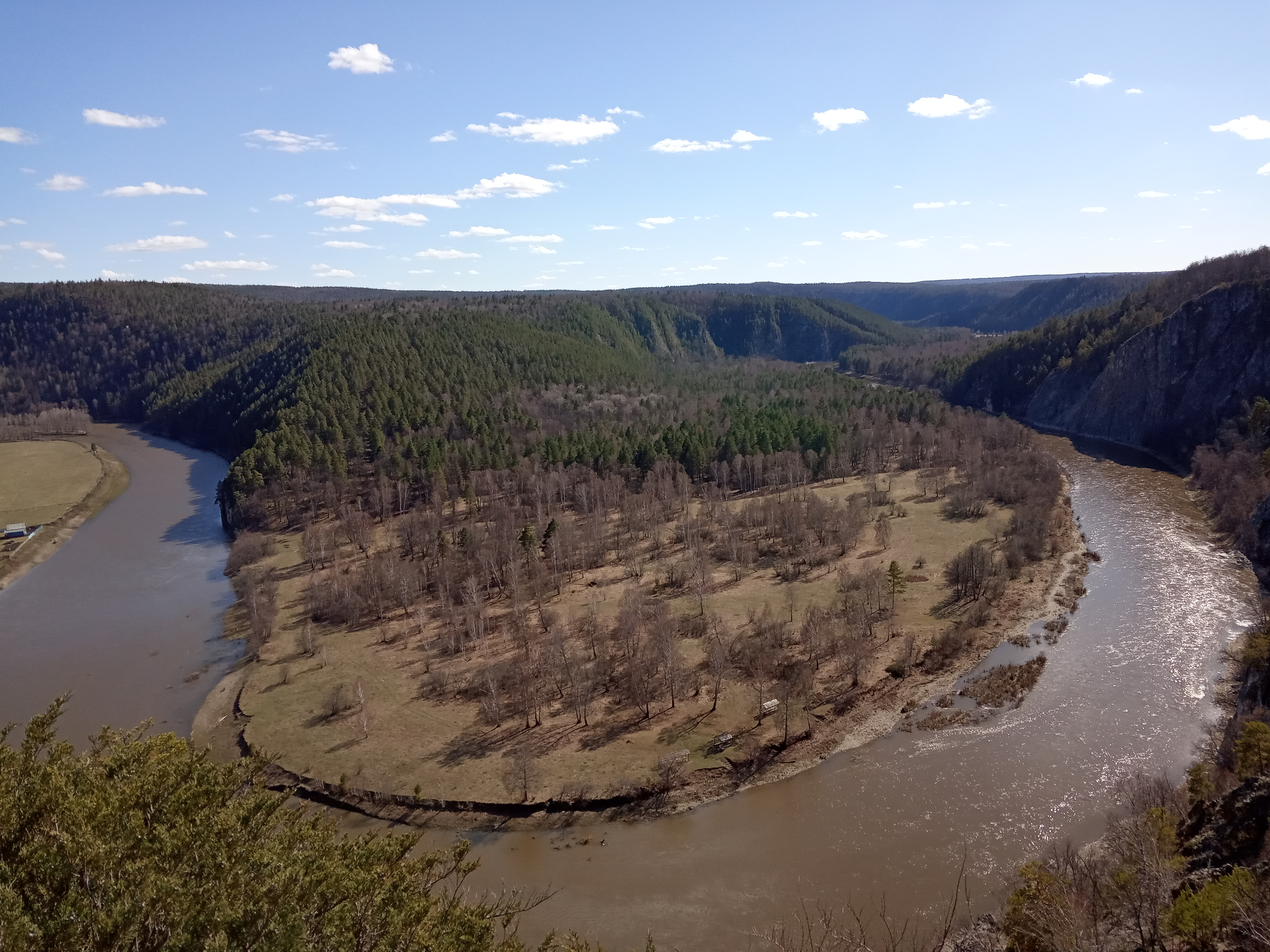 Деревня Ишдавлетово (Ябак) Бурзянского района Респ.Башкортостан